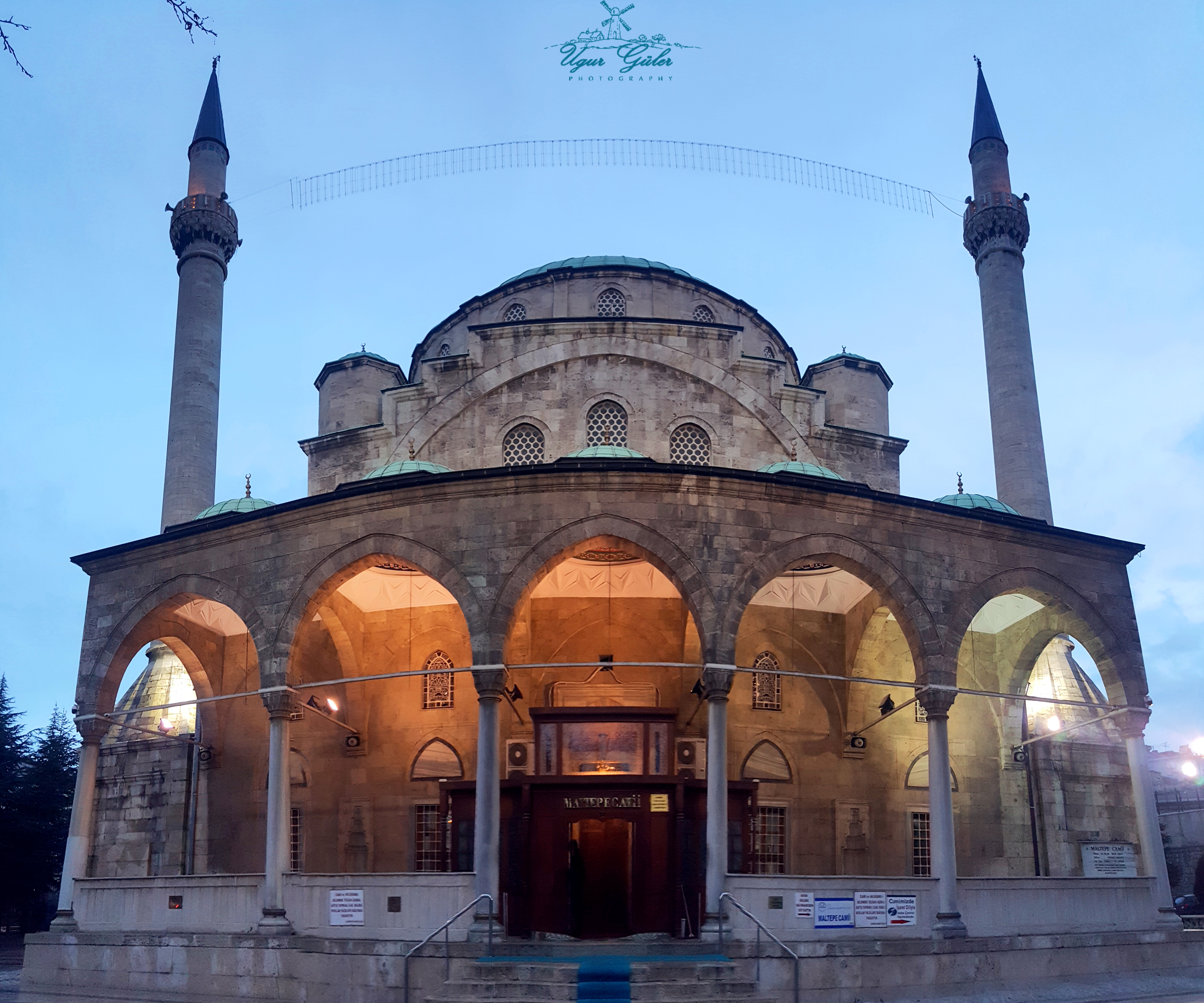 Maltepe Cami